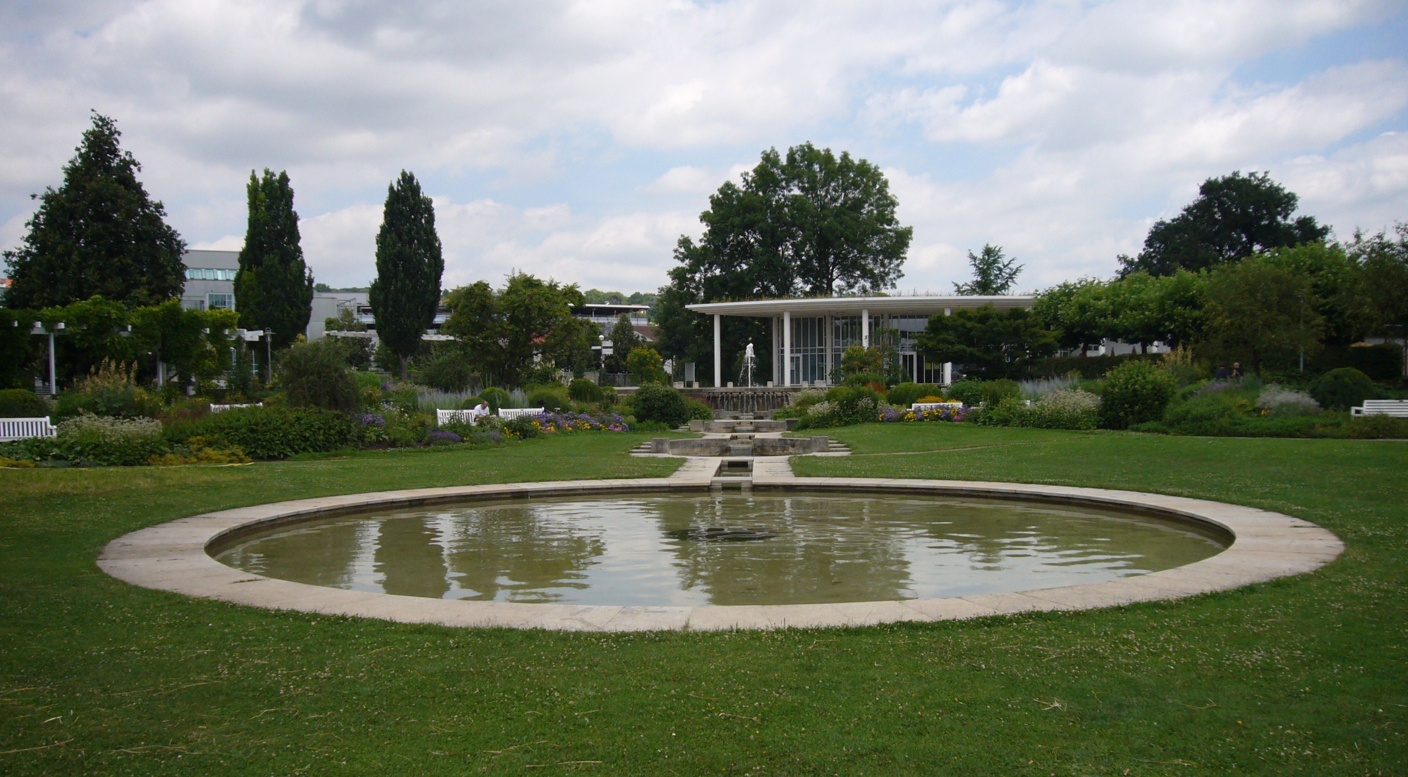 Anlässlich der Landesgartenschau 1989 angelegter Bügergarten in Bietigheim-Bissingen